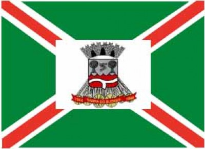 Bandeira do município brasileiro de Barra do Bugres